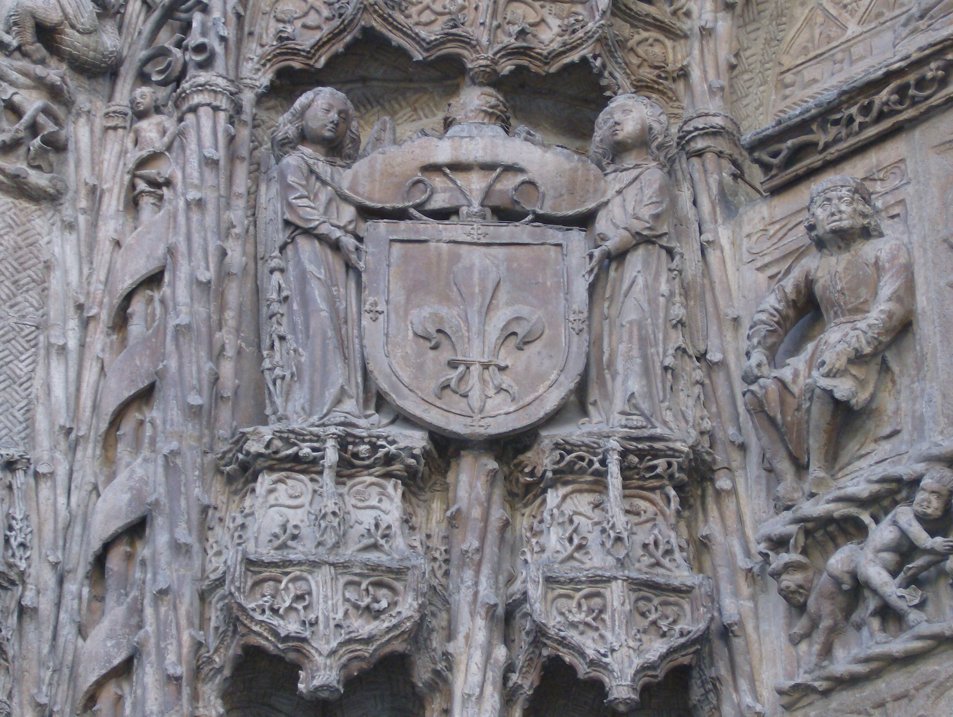 Colegio de San Gregorio (Valladolid)